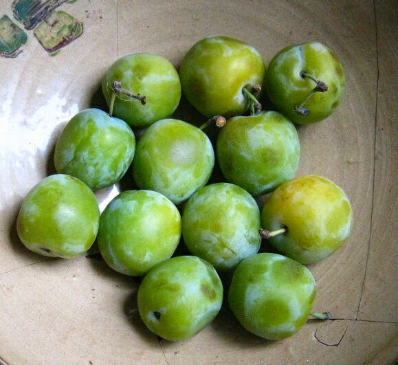 Prunes de la variété Reine-Claude.